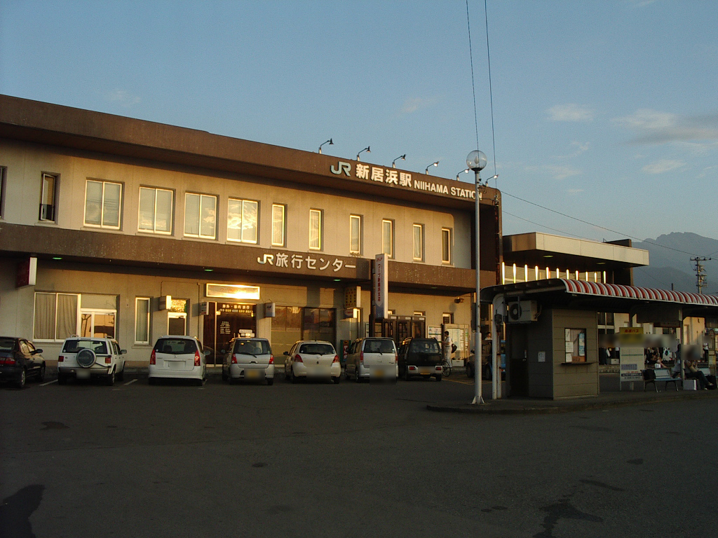 四国旅客鉄道予讃線新居浜駅